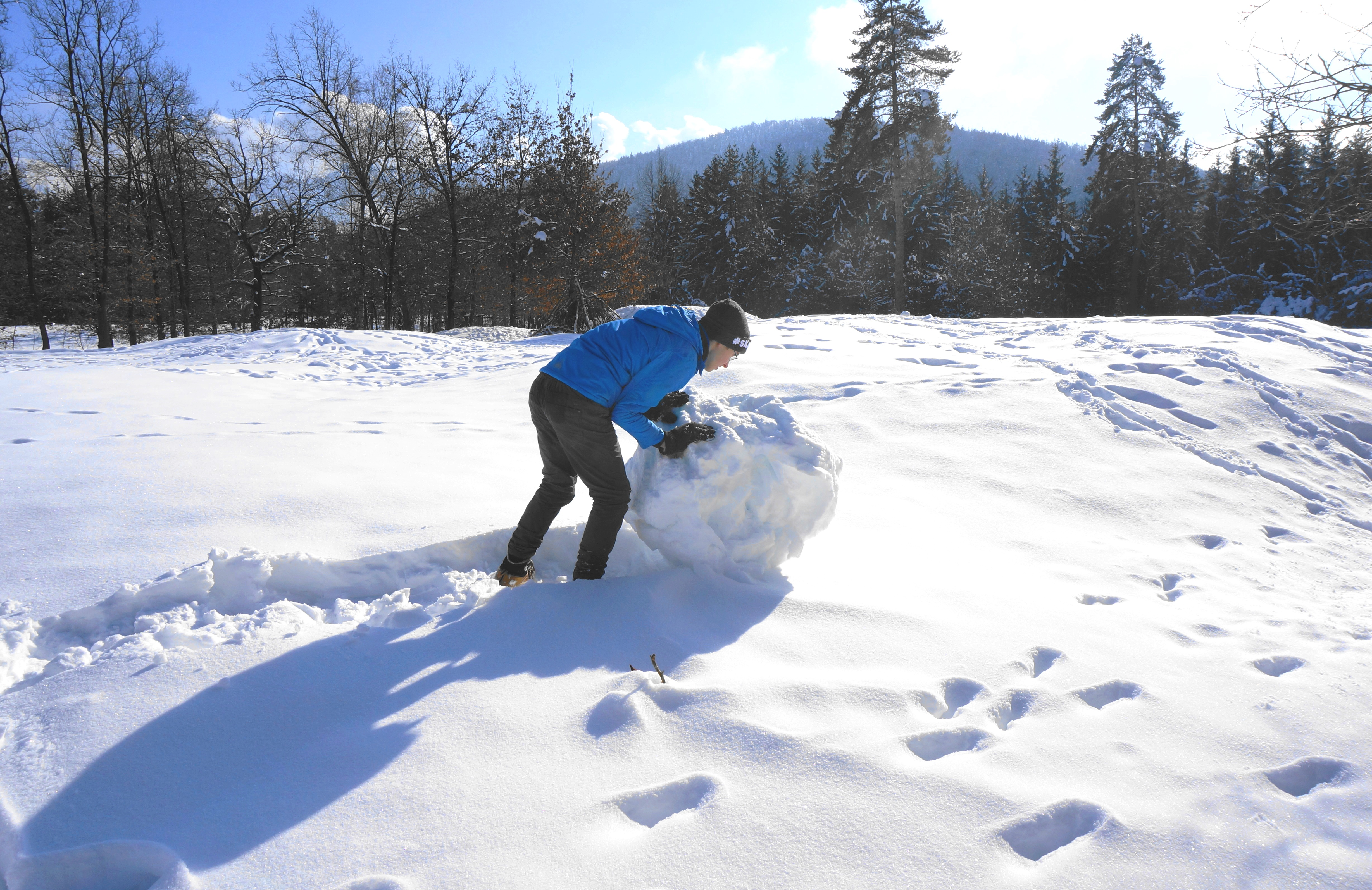 Der feuchte Schnee wird zu einer kompakten Kugel gerollt. Danach sind Kreativität und freie Gestaltungsmöglichkeiten gefragt, um das gewünschte Aussehen zu erreichen.